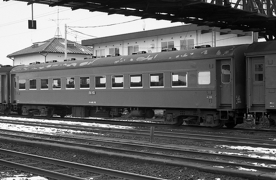 国鉄 オハ46 16